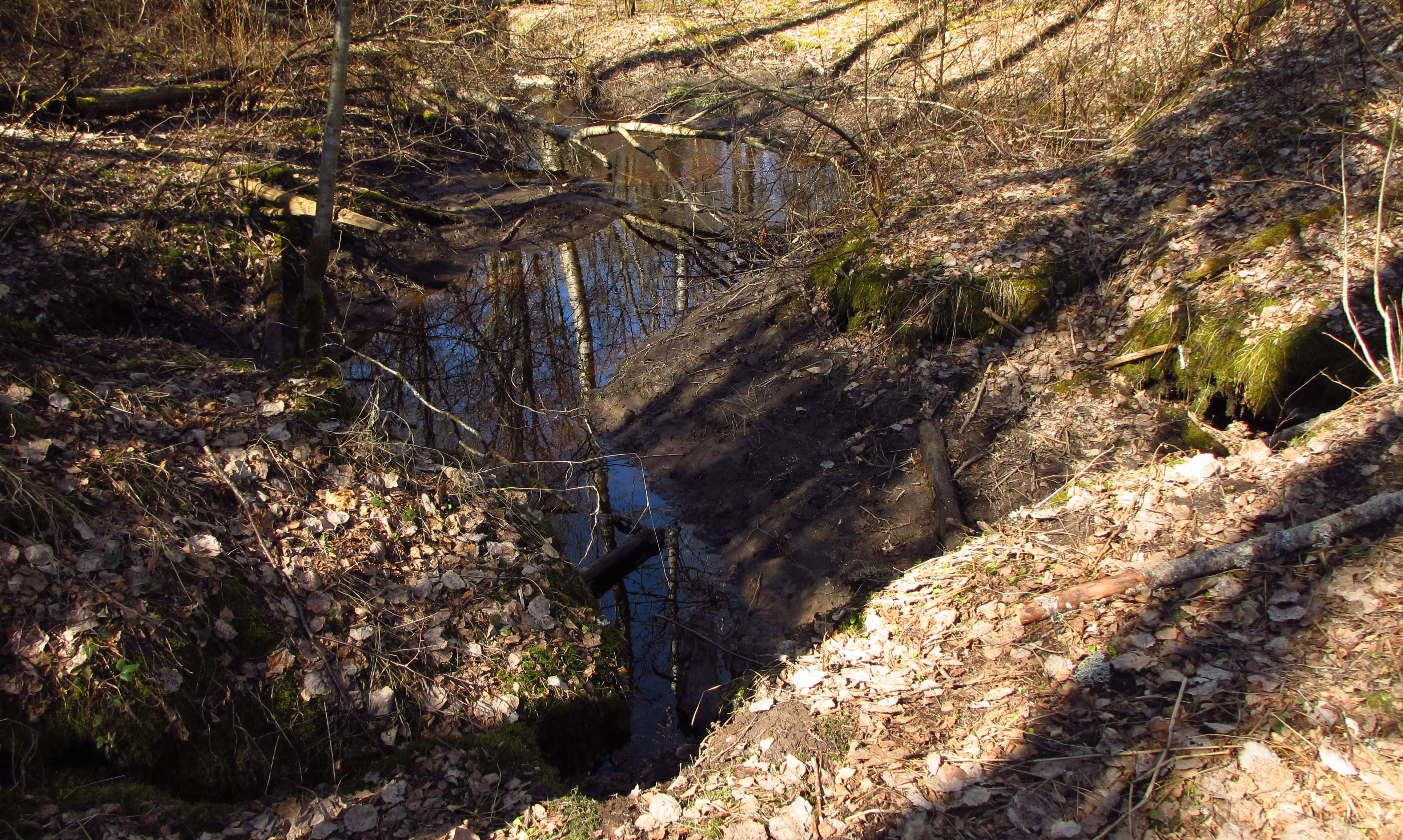 Urge kuristik